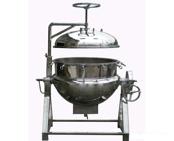 Steam Jacketed Heat Exchanger